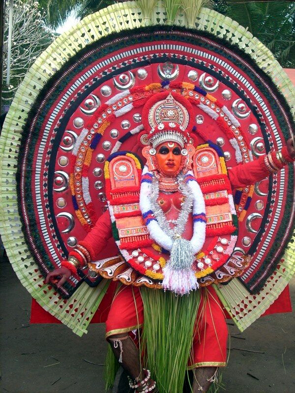 ചാമുണ്ടി തെയ്യം- ഉഴുമ്മൽ ശ്രീ മാക്കിയിൽ മുണ്ടിയങ്കാവ് ക്ഷേത്രത്തിൽ.